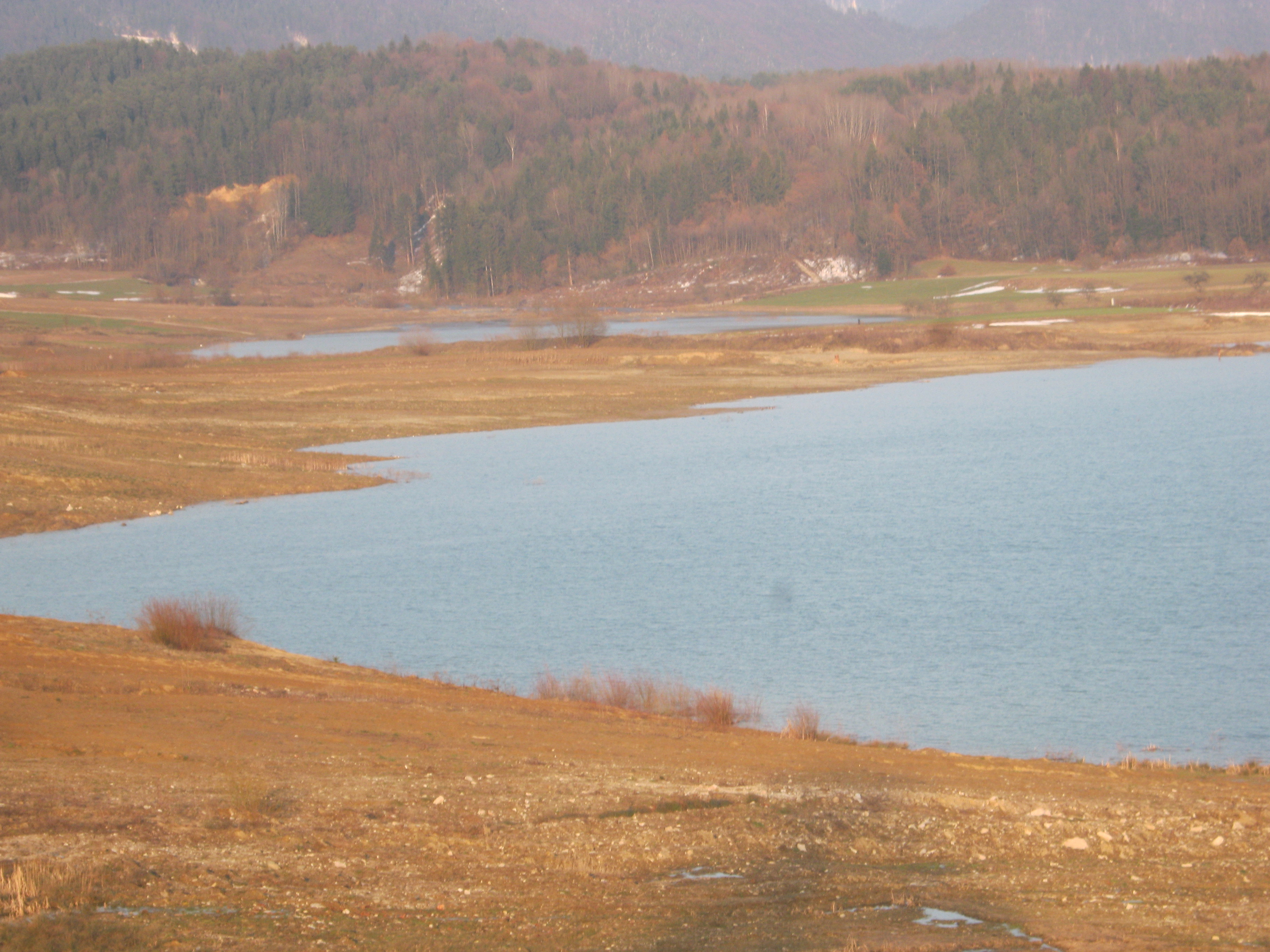 Eno od jezer, ki je nastalo kot posledica rudarjenja, je Družmirsko.